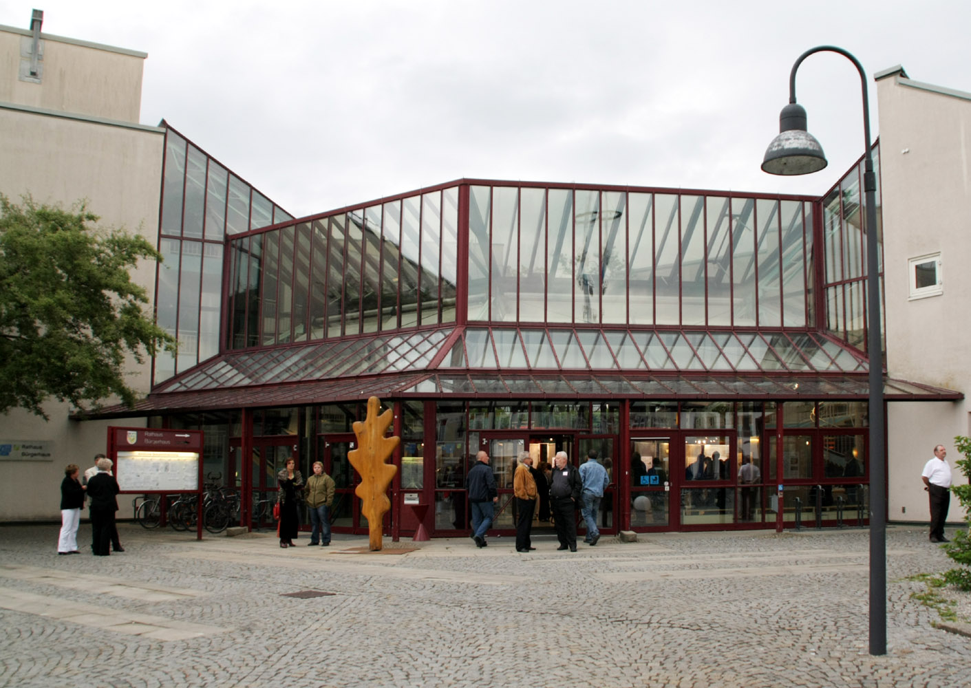 Rathaus Unterschleißheim